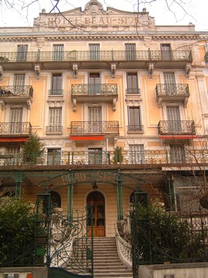 Ancien hôtel palace le Beau site présent dans le ville d'Aix-les-Bains en France dans le département de la Savoie.